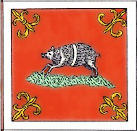 Bandiera della magistratura di Sant'Antonio del Gioco del Ponte di Pisa